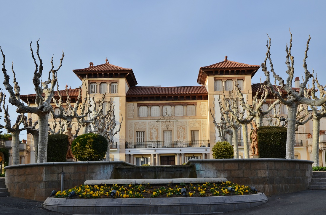 Solers (Sant Pere de Ribes)